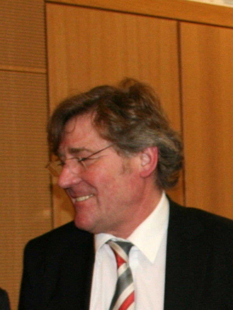 Siegmund Ehrmann, Beauftragter der SPD-Bundestagsfraktion für Kirchen und Religionsgemeinschaften.